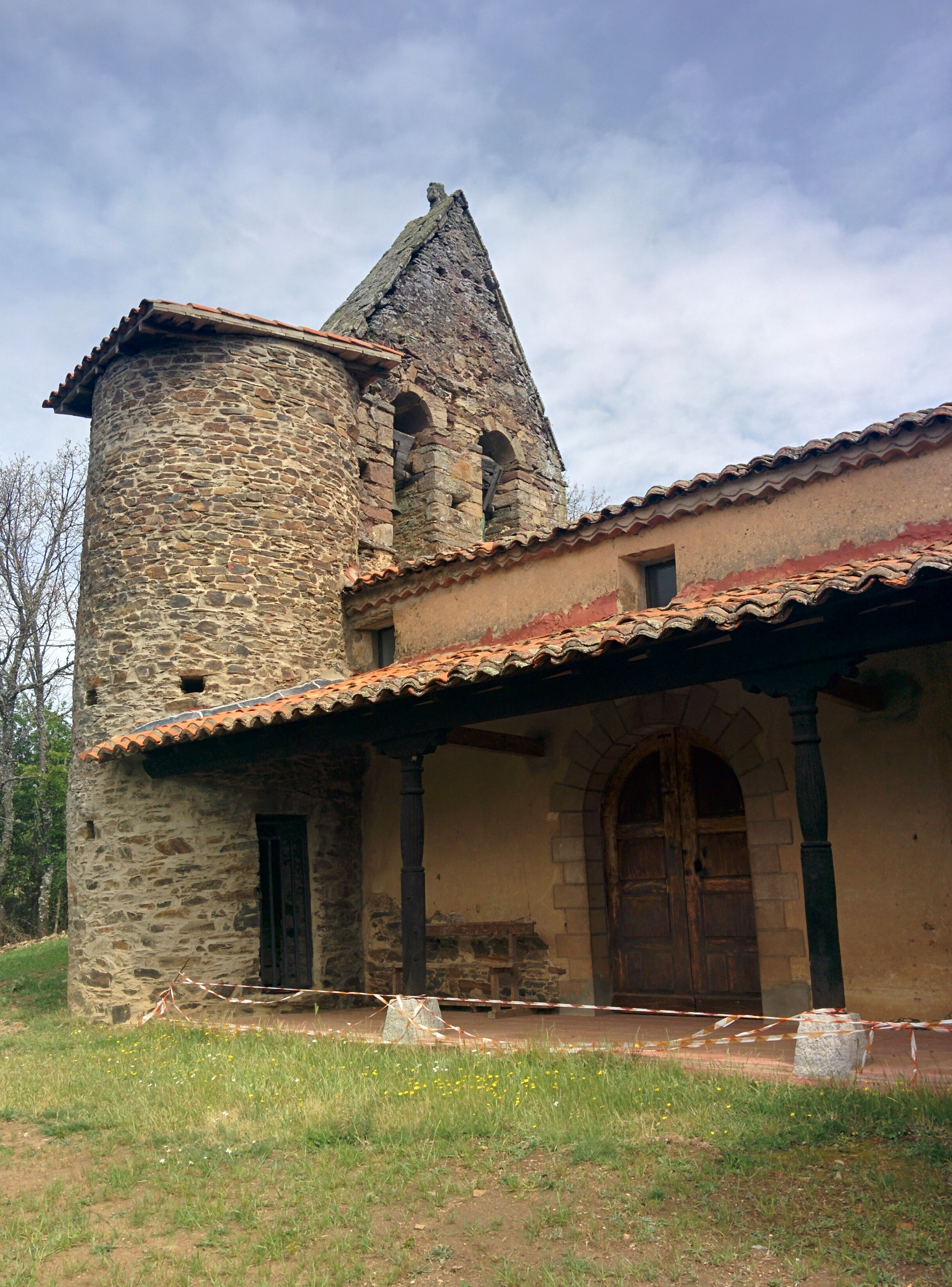 Iglesia de Santiago Apóstol, en Adrados de Ordás (León, España).